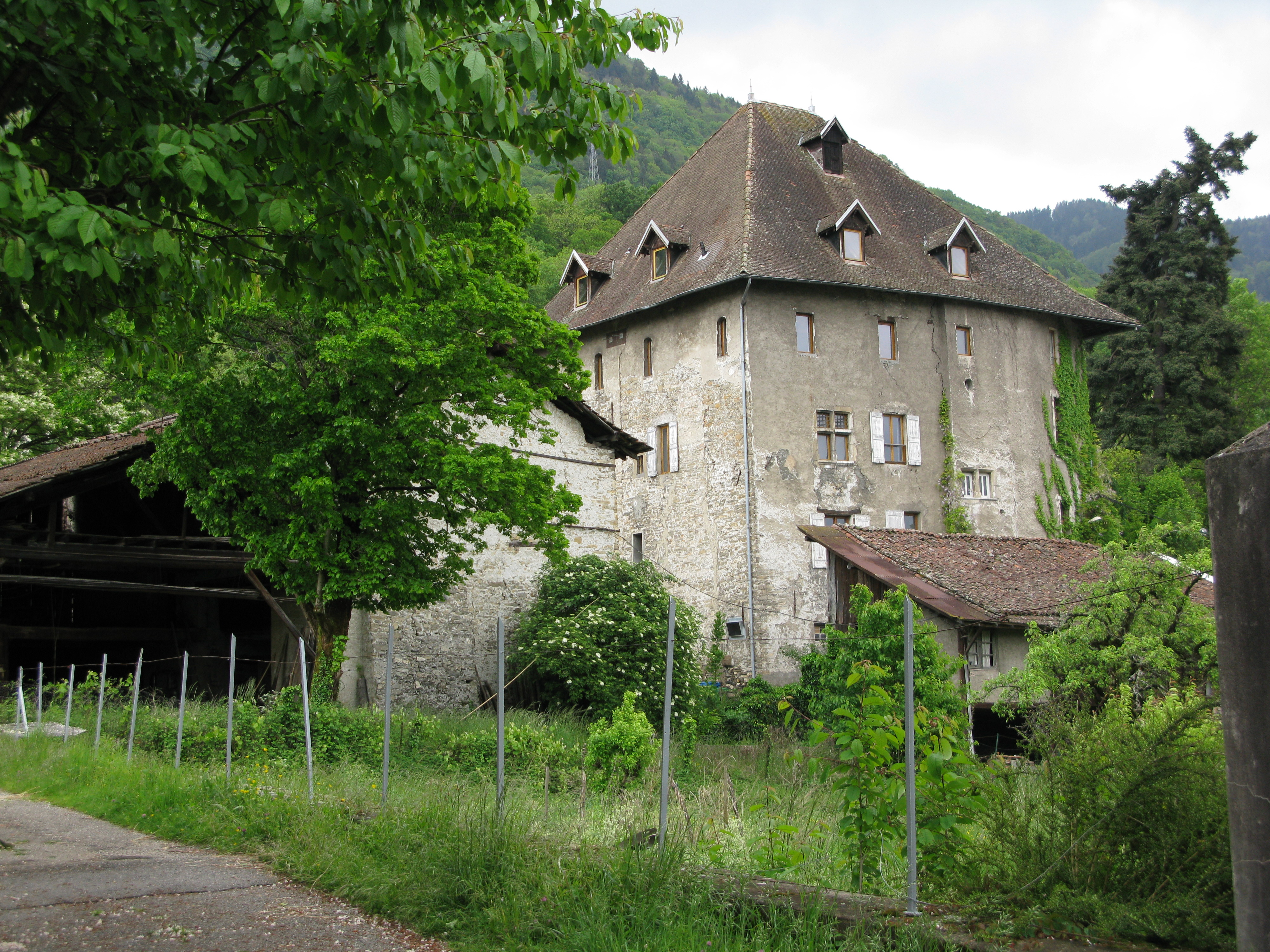 Goncelin (38), le "chateau"